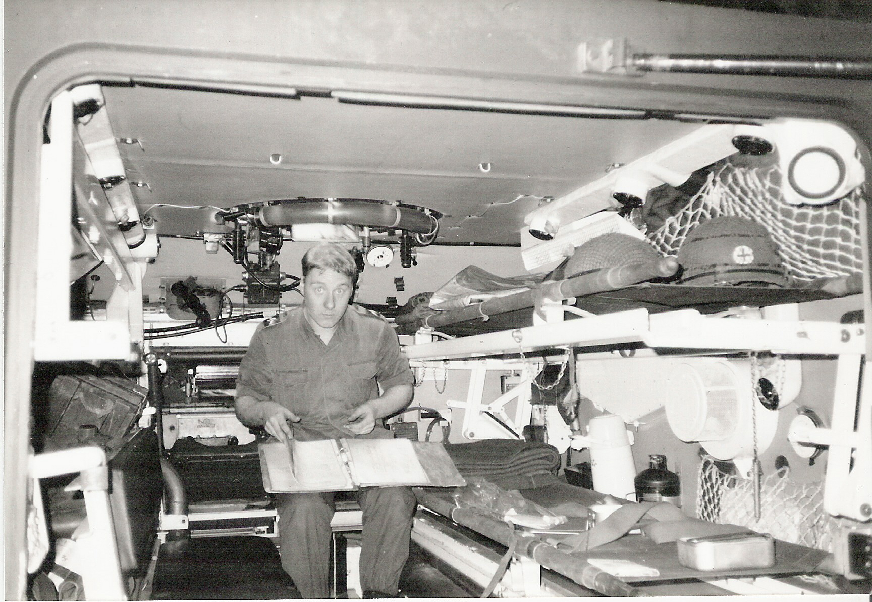 Intérieur char CVRT type Samaritan - 4e Chasseurs à Cheval - FTX Golden Crown 1988